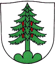 Wappen der Gemeinde Walchwil im Kanton Zug / Schweiz